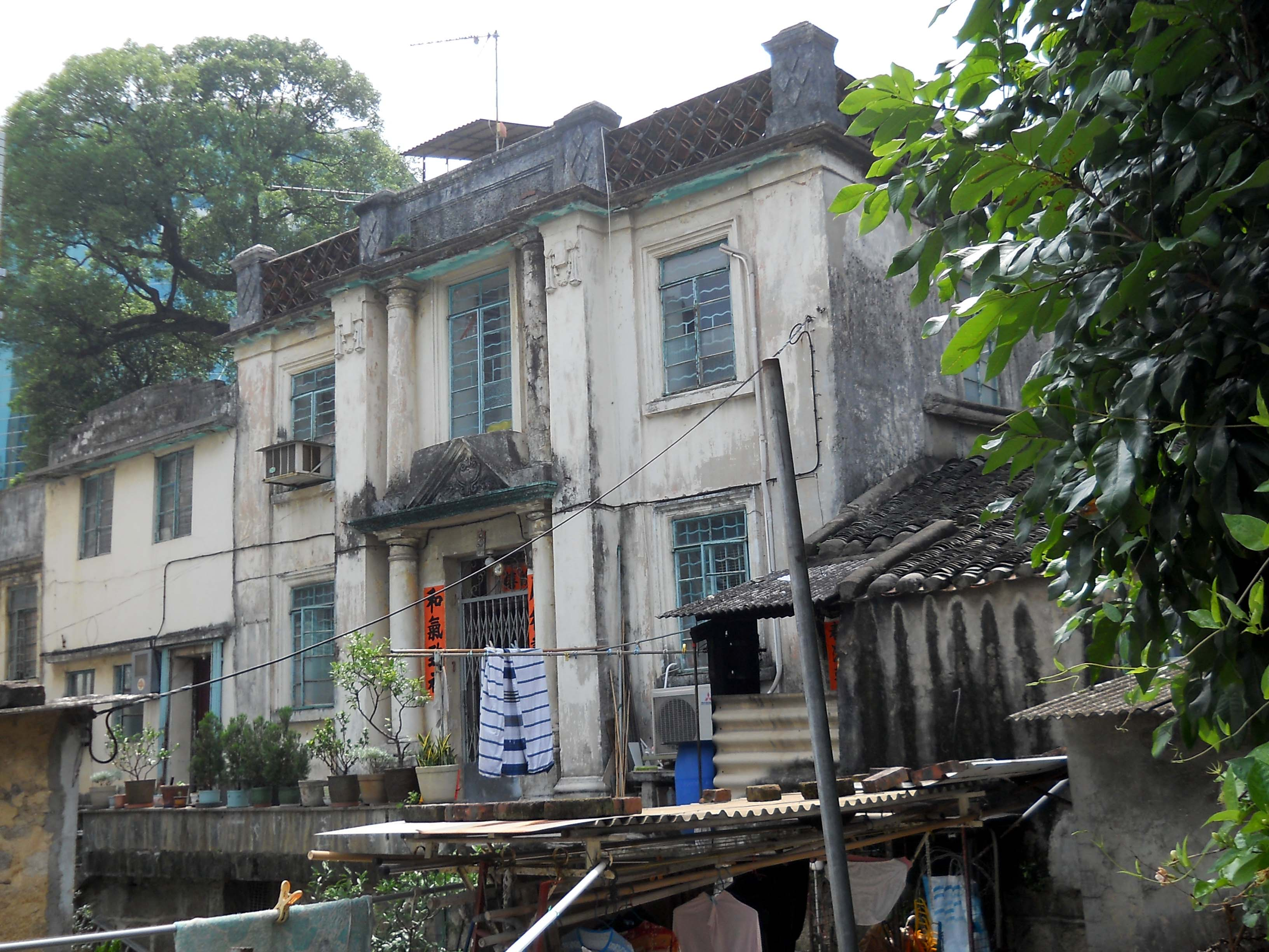 中文（香港）: 上禾輋7至10號